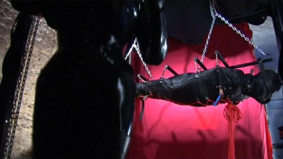 Suspenssion dans un sleeping bag